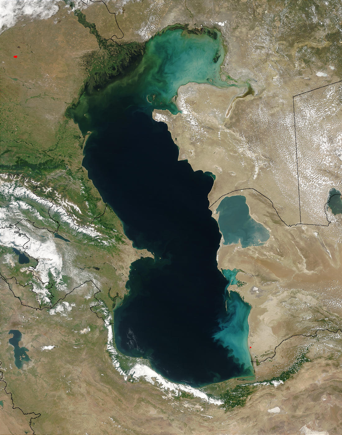 Satellitenaufnahme des Kaspischen Meeres von NASA’s Visible Earth in Public Domain